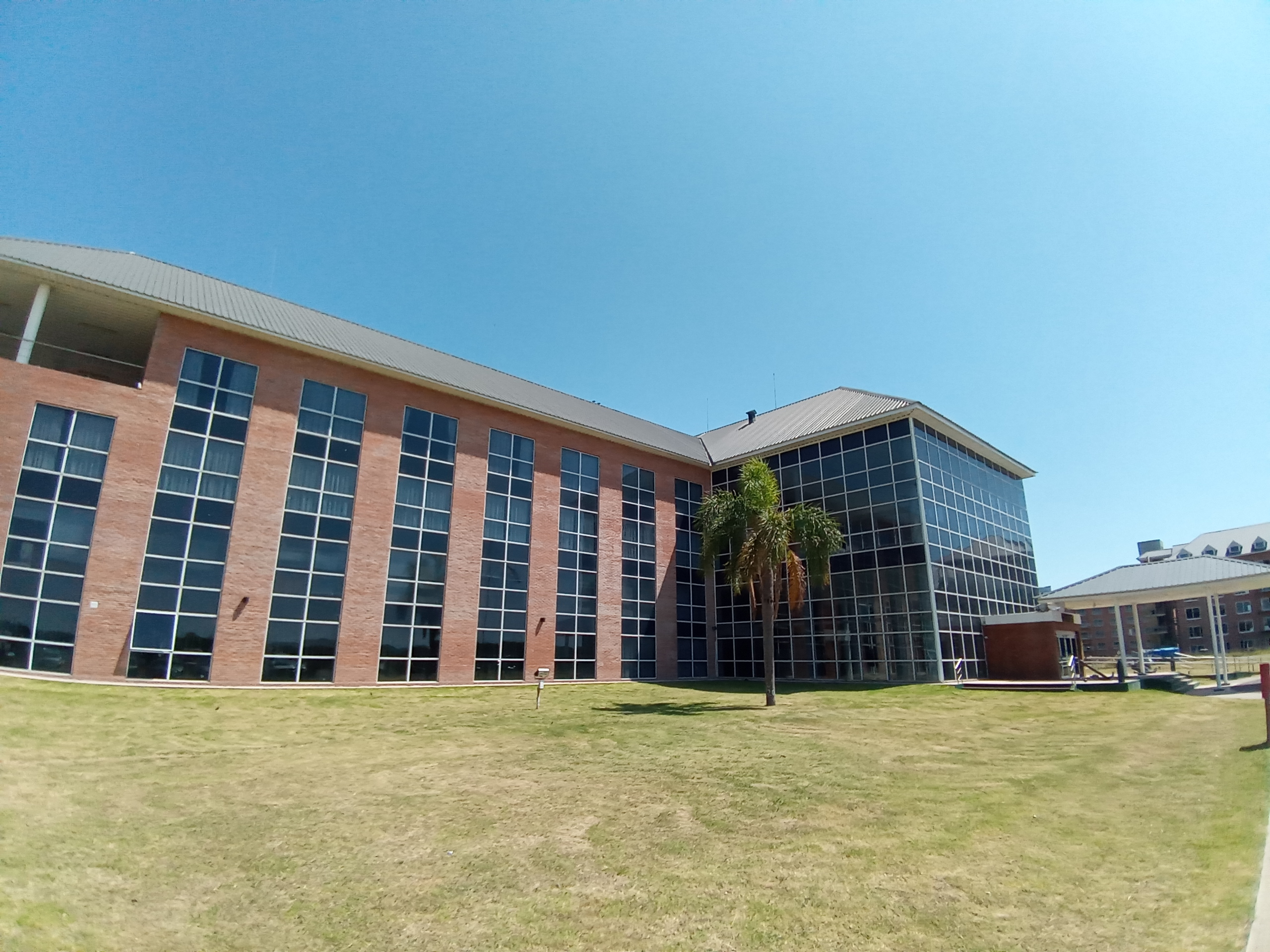 Edificio de la DGED y la DGID (Armada Argentina). Autoría propia. Sede actual de la Facultad de la Armada (dependiente de la UNDEF). Laprida 555, Vicente López, Buenos Aires, Argentina.